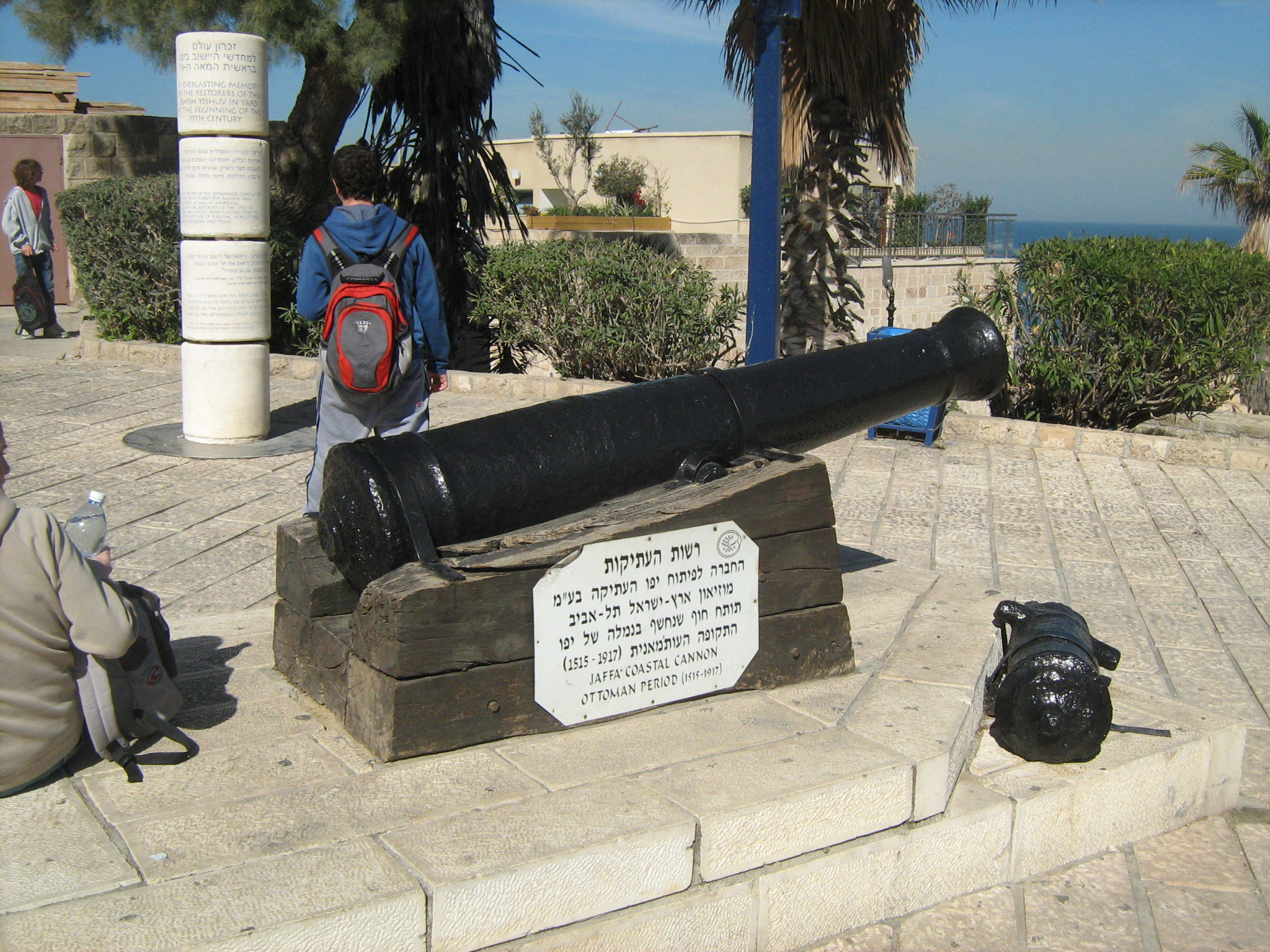 תותח ביפו העתיקה